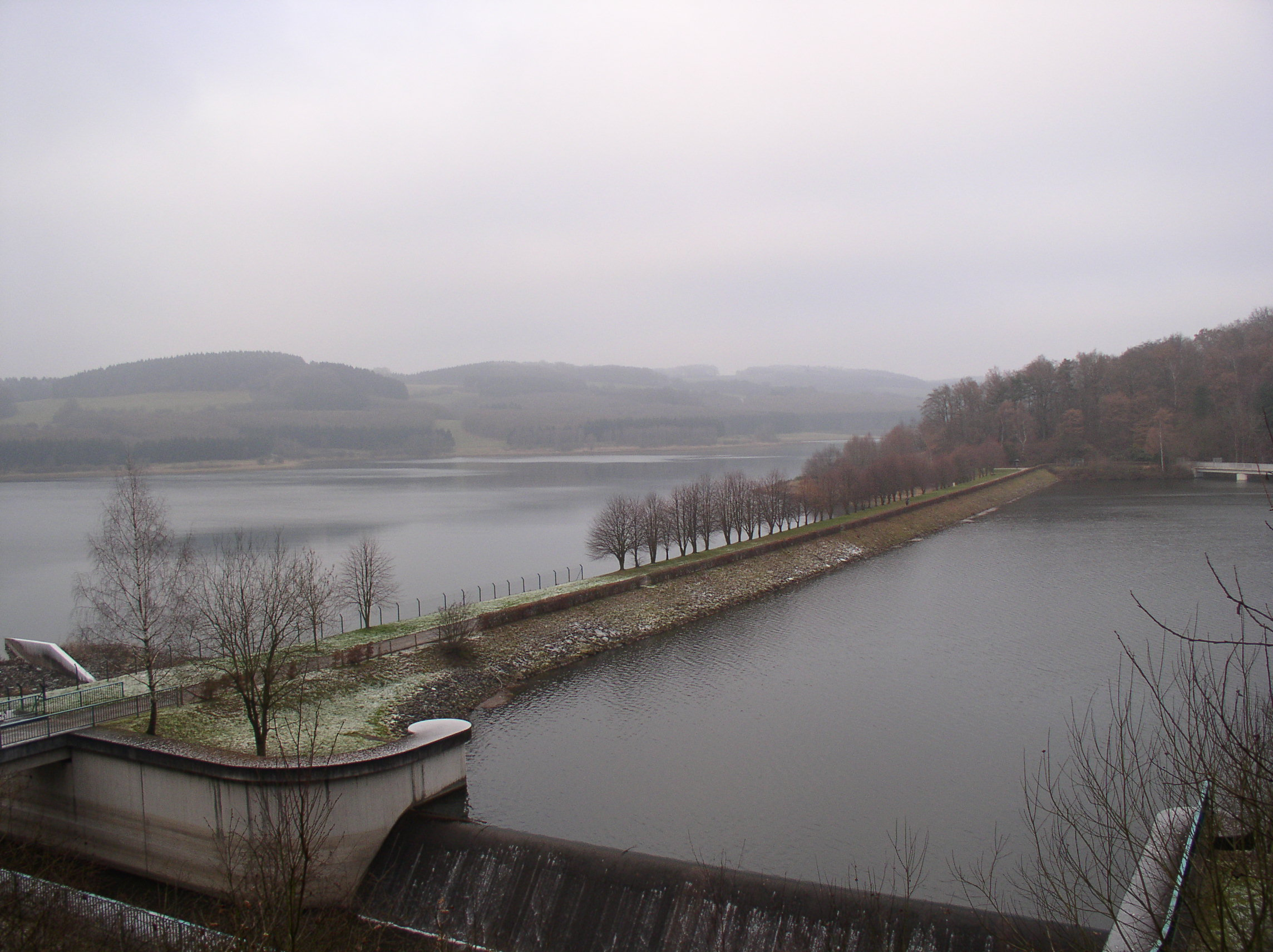 Vorsperre Große Dhünntalsperre